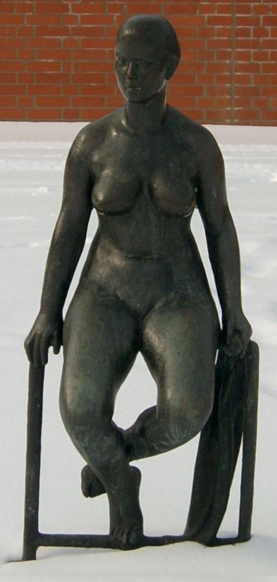 Statue Die Schwimmerin von Fritz Cremer[1] in Frankfurt (Oder) unweit der Oder, nördlich der Stadtbrücke. - OpenStreetMap(Info)